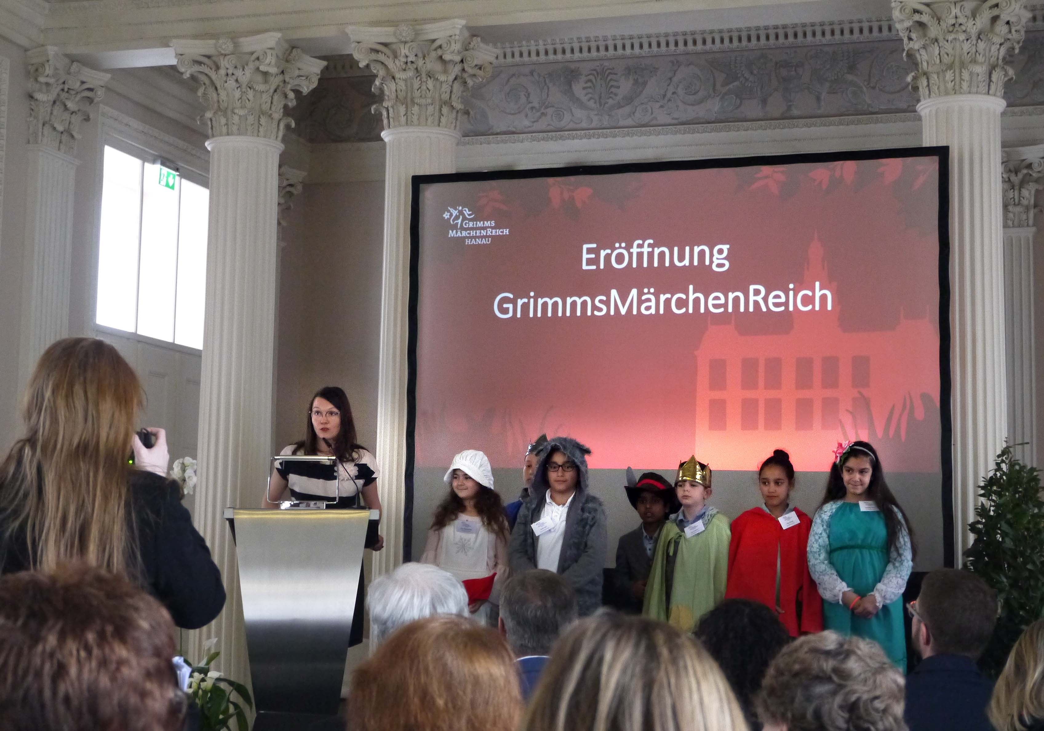 Eröffnung des GrimmsMärchenreich in Hanau mit der Leiterin Nina A. Schneider und Mitgliedern des beratenden Kinderkomitees